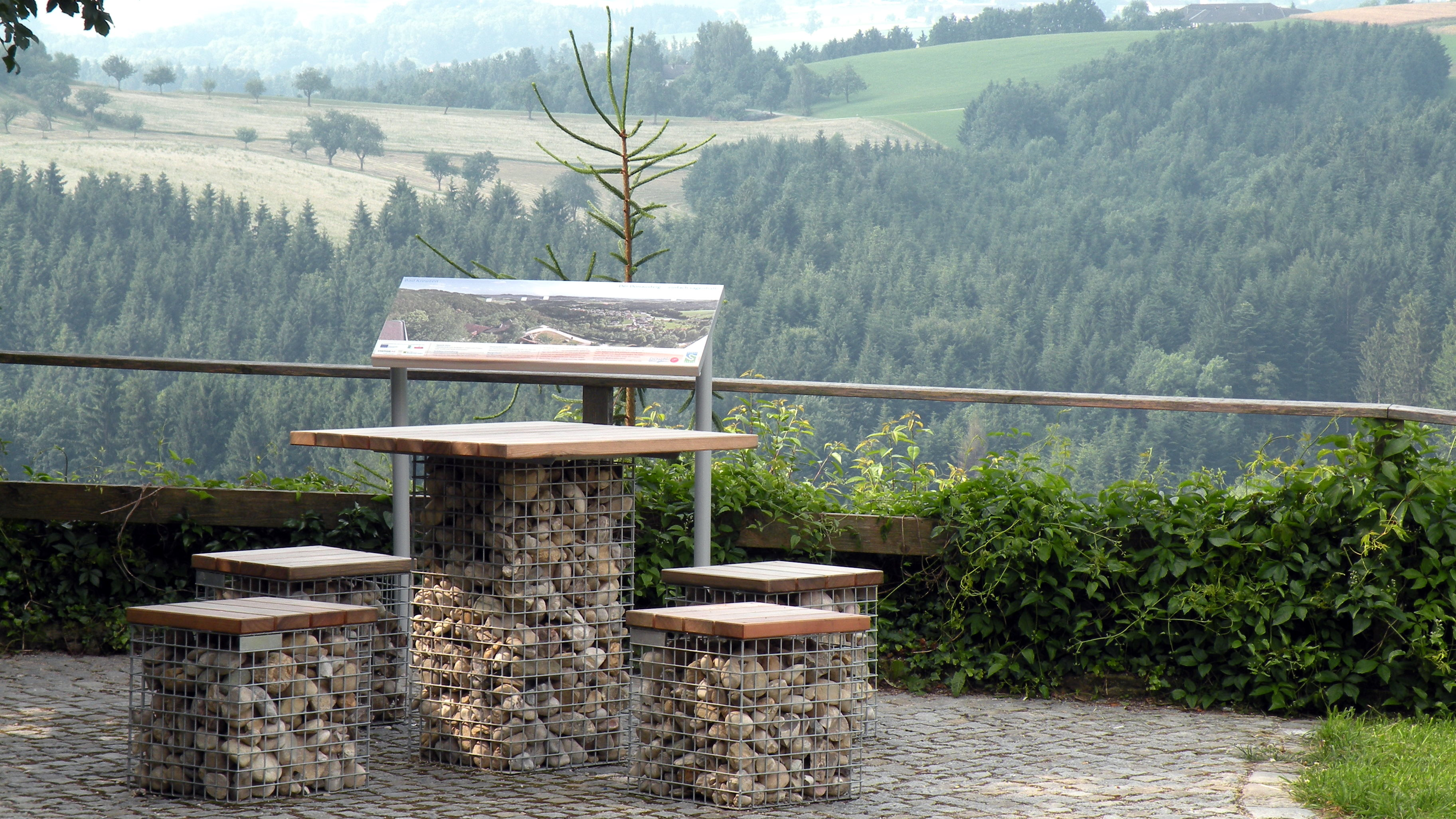 Donausteig Rastplatz bei der Burg Bad Kreuzen